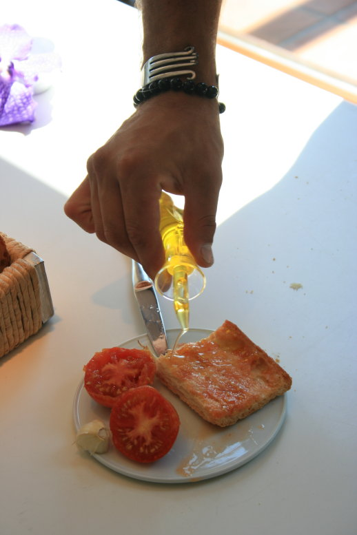 Pa amb Tomaquet